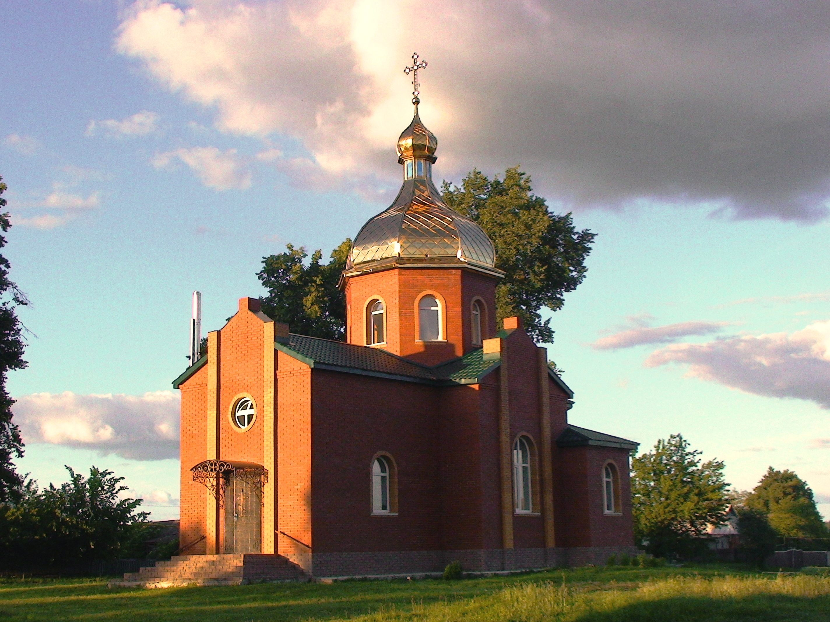 Возрождение духовности